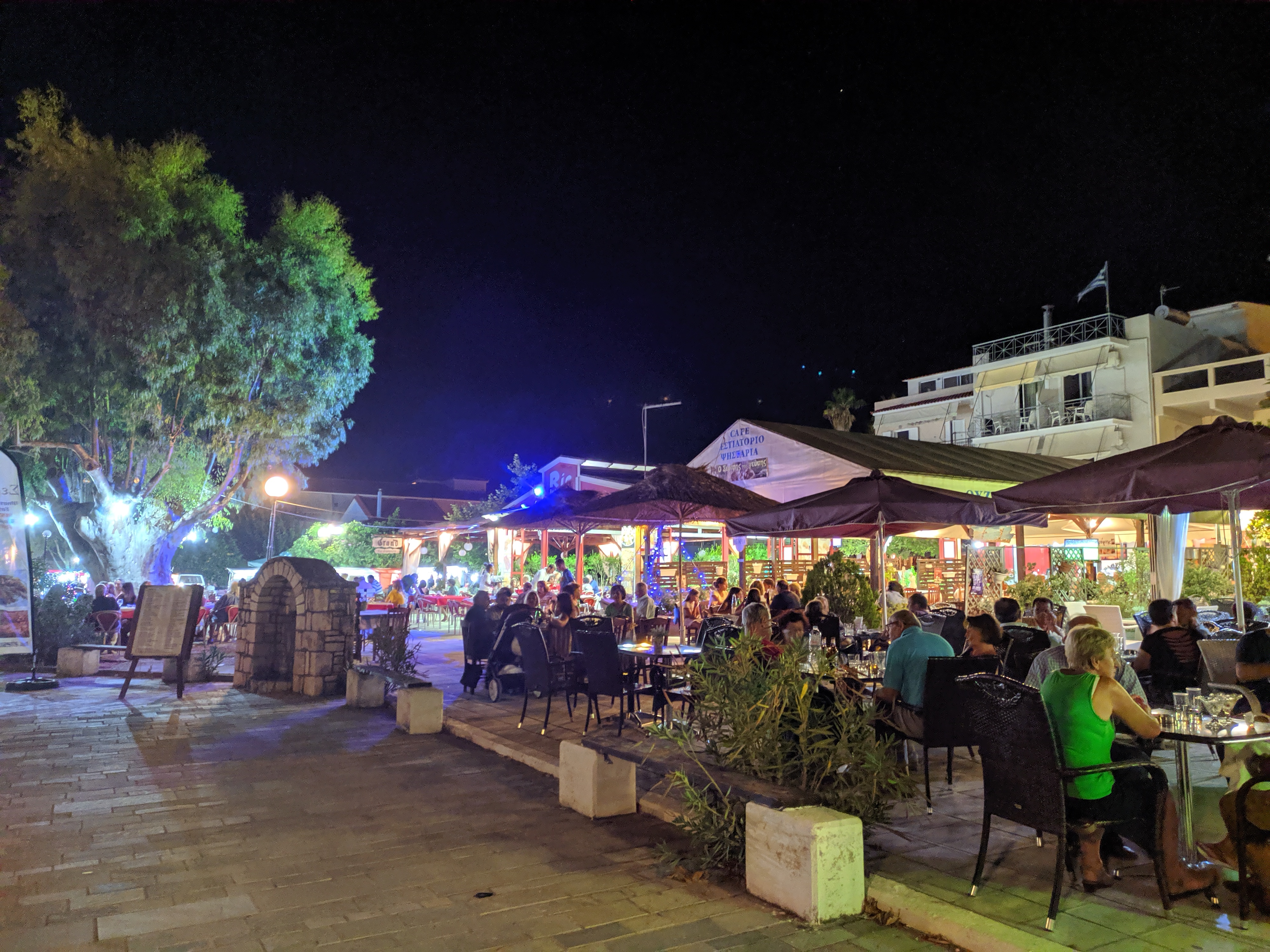 Μαγαζιά εστίασης στην κεντρική πλατεία (Άγιος Ανδρέας Μεσσηνίας).